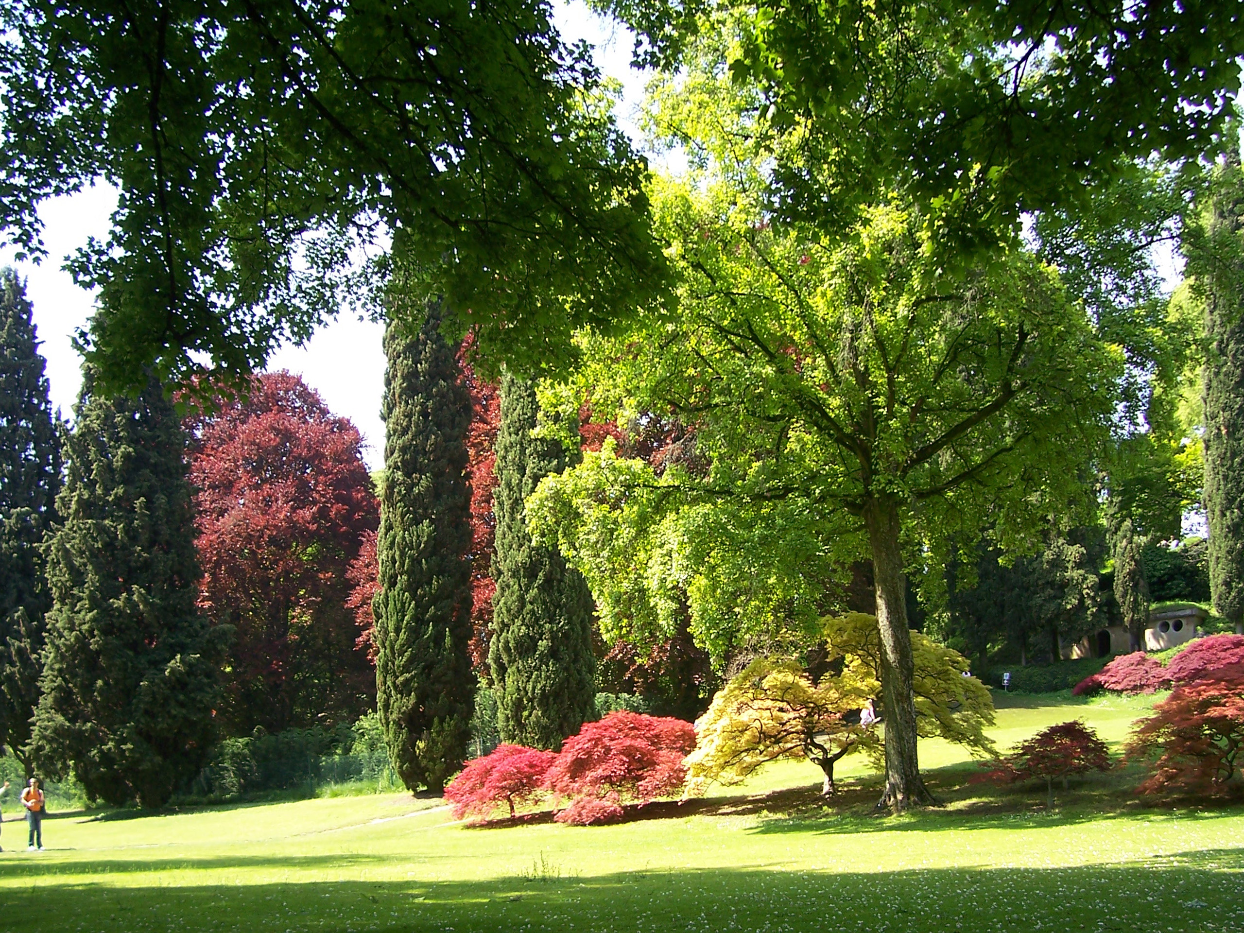 Parco Giardino Sigurtà